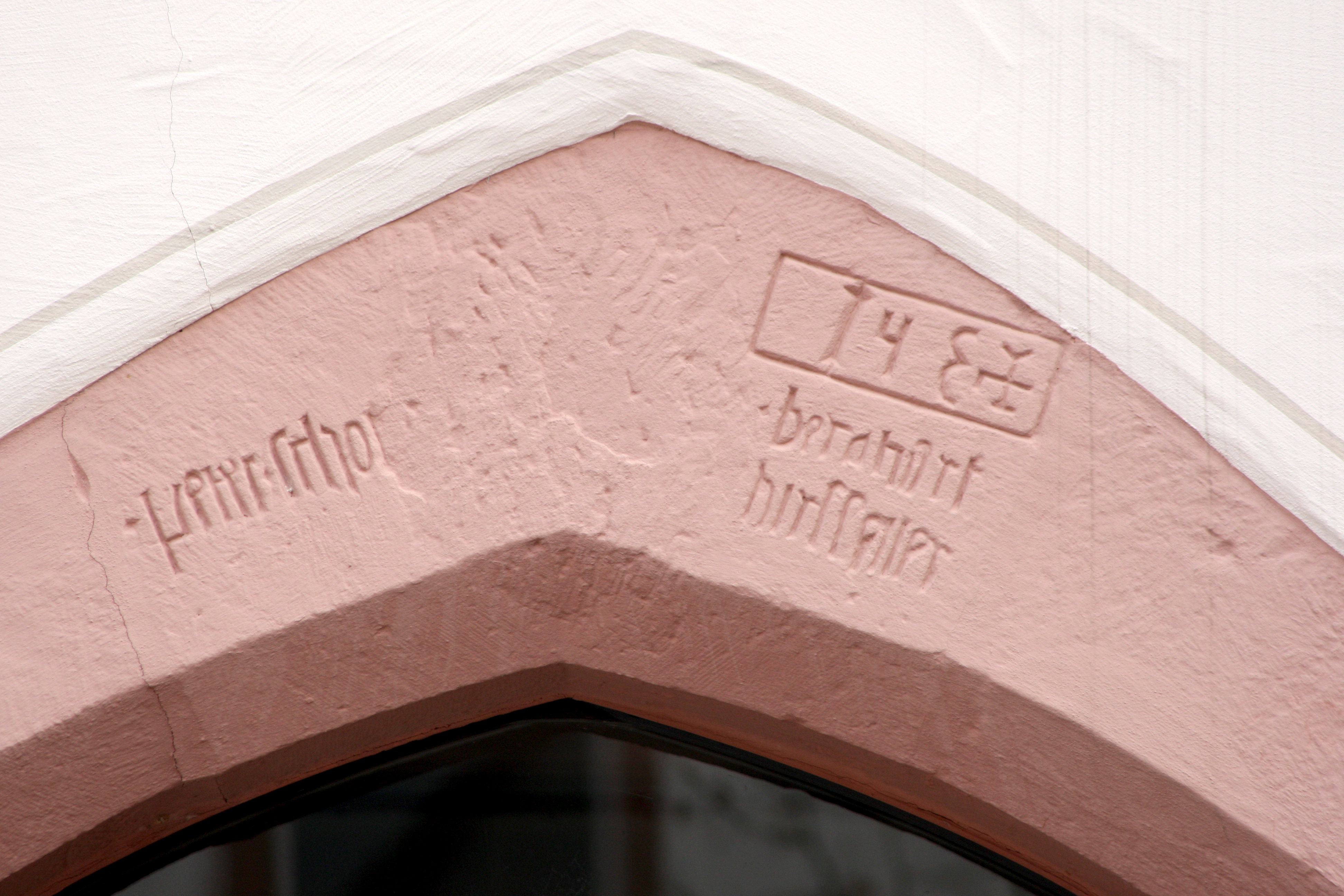 Inschrift über dem Türsturz des Seitenportals am alten Mudauer Rathaus